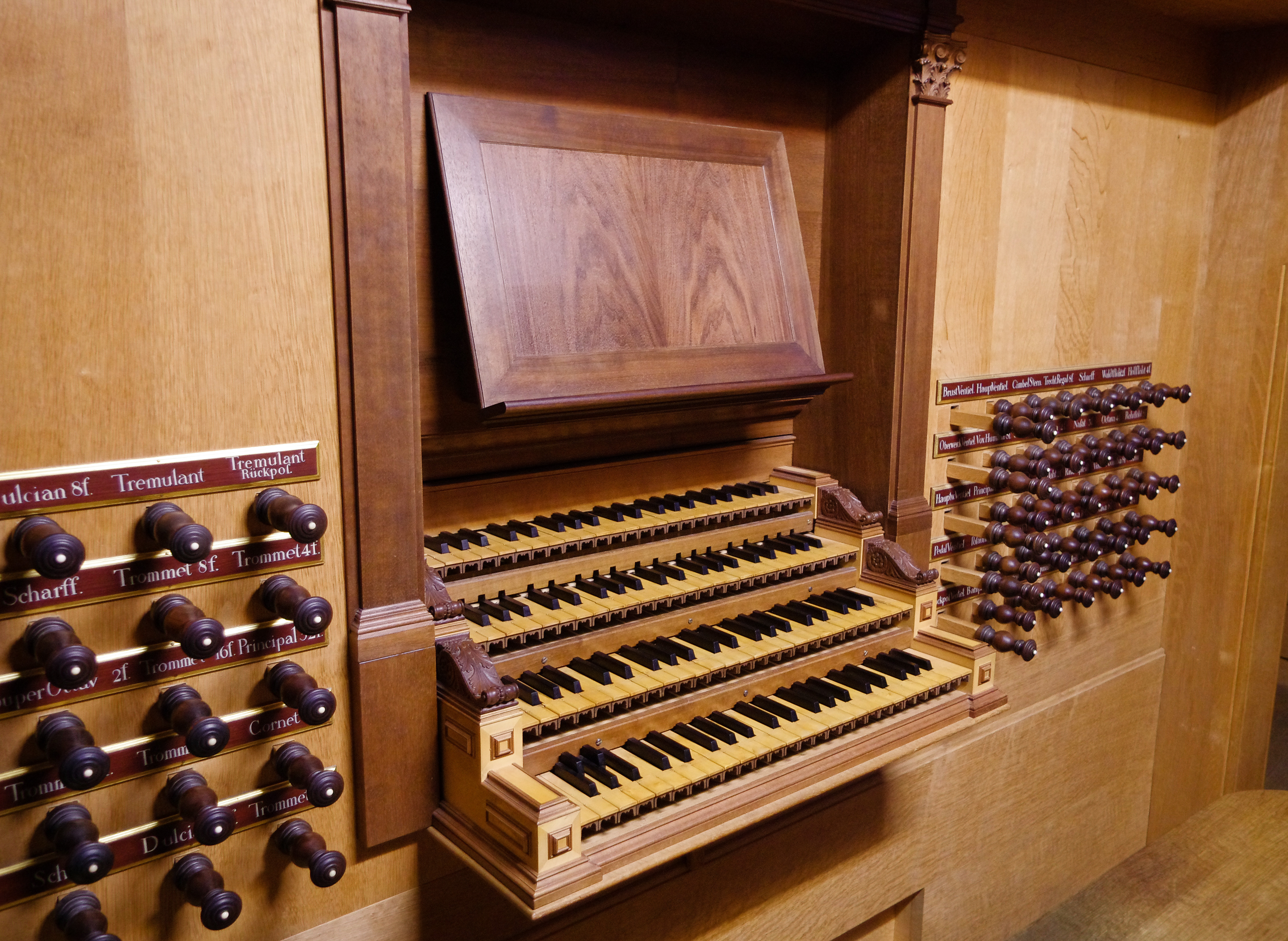 Organ console, Spieltisch, Schnitger organ, St. Jacobi, Hamburg